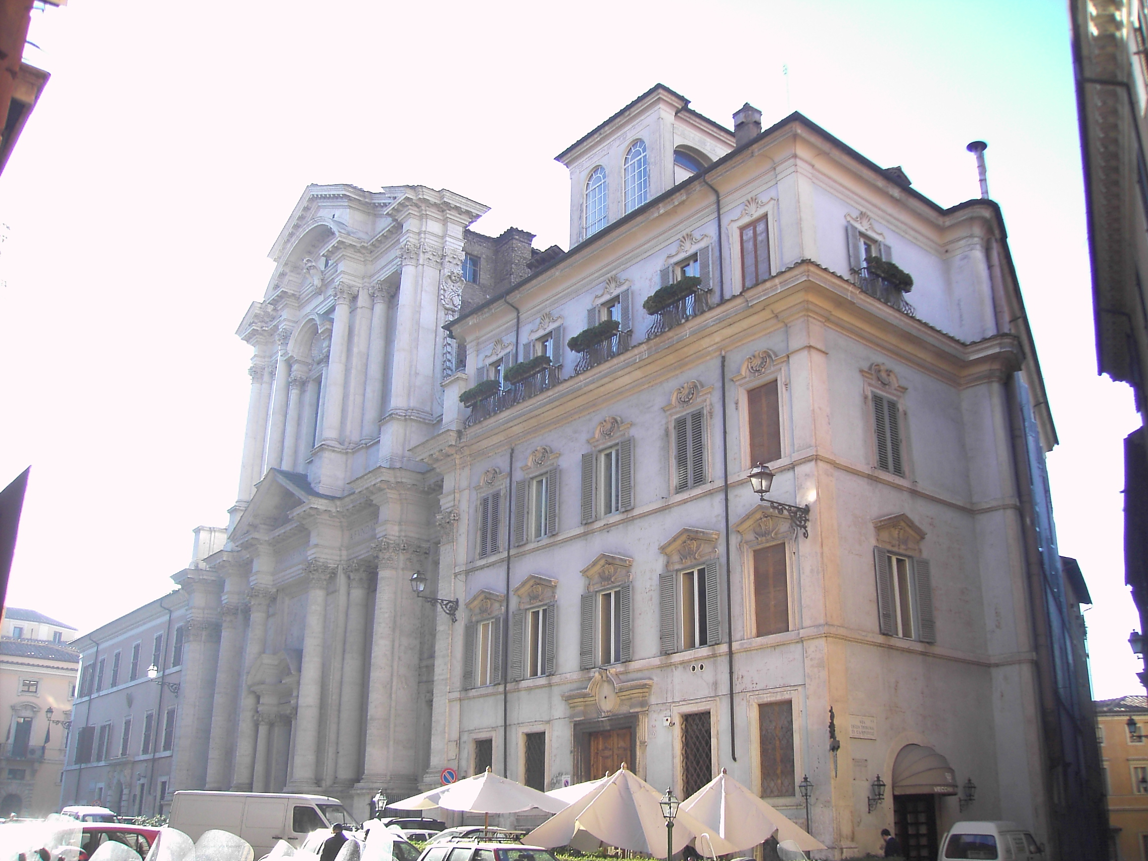 Roma, piazza Campitelli.